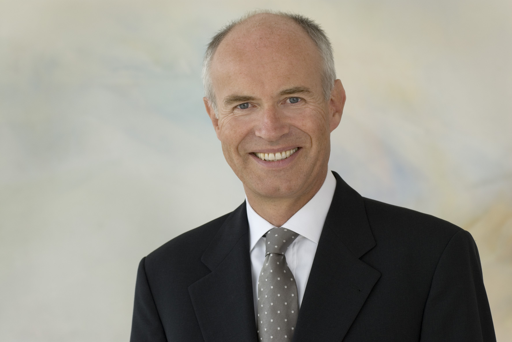 Götz Rehn